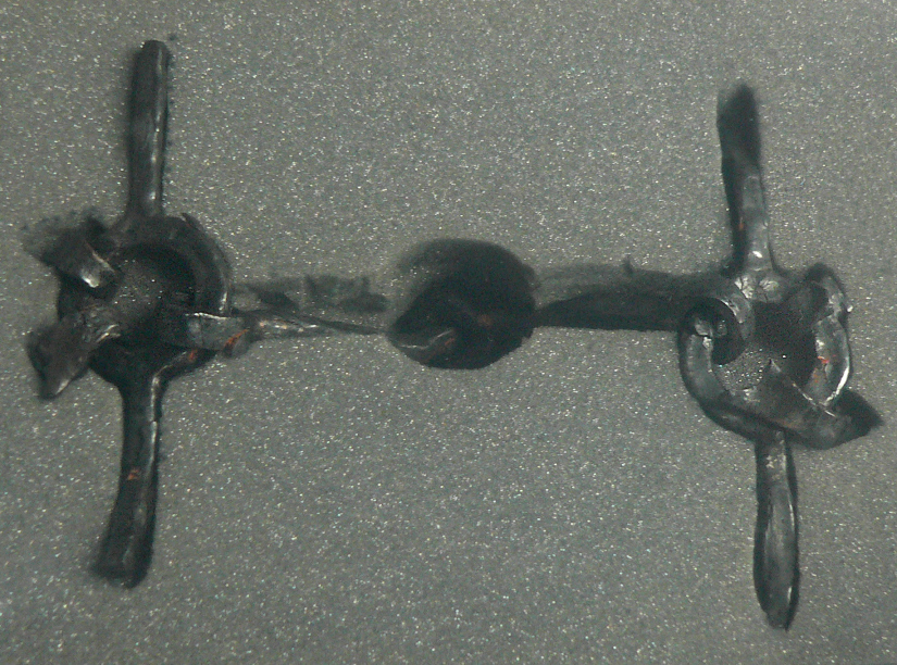 Pferdetrense, gefunden bei der Ausgrabung der Siedlungskammer Rullstorf, Foto aufgenommen bei der Ausstellung "Pferd und Sachsen bei den Altsachsen" im Kloster Ebstorf, schlechte Bildqualität, da Fundstück in Plastikfolie unter Schutzgas verpackt.